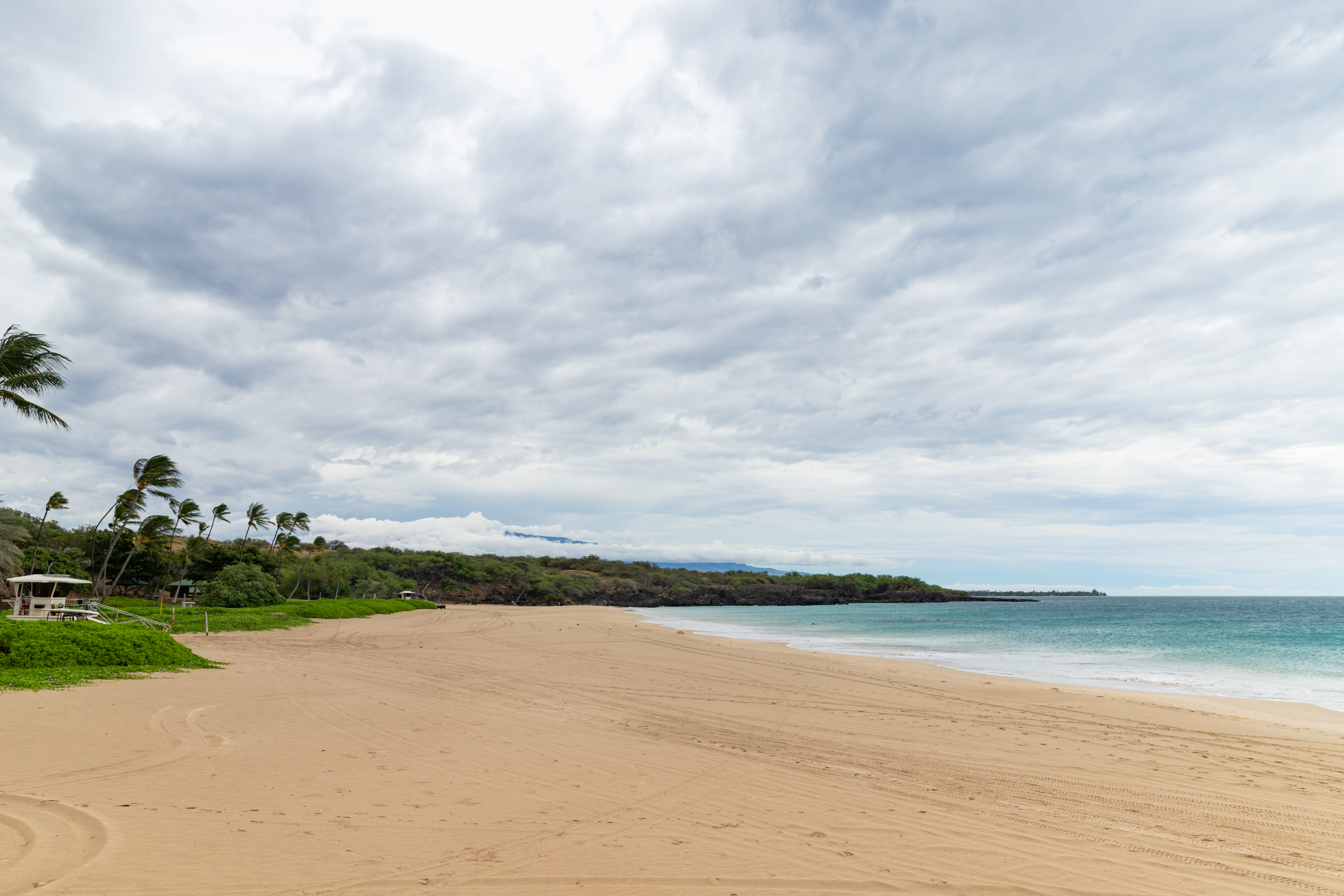 Hapuna beach Hilo Big island, Hawaii